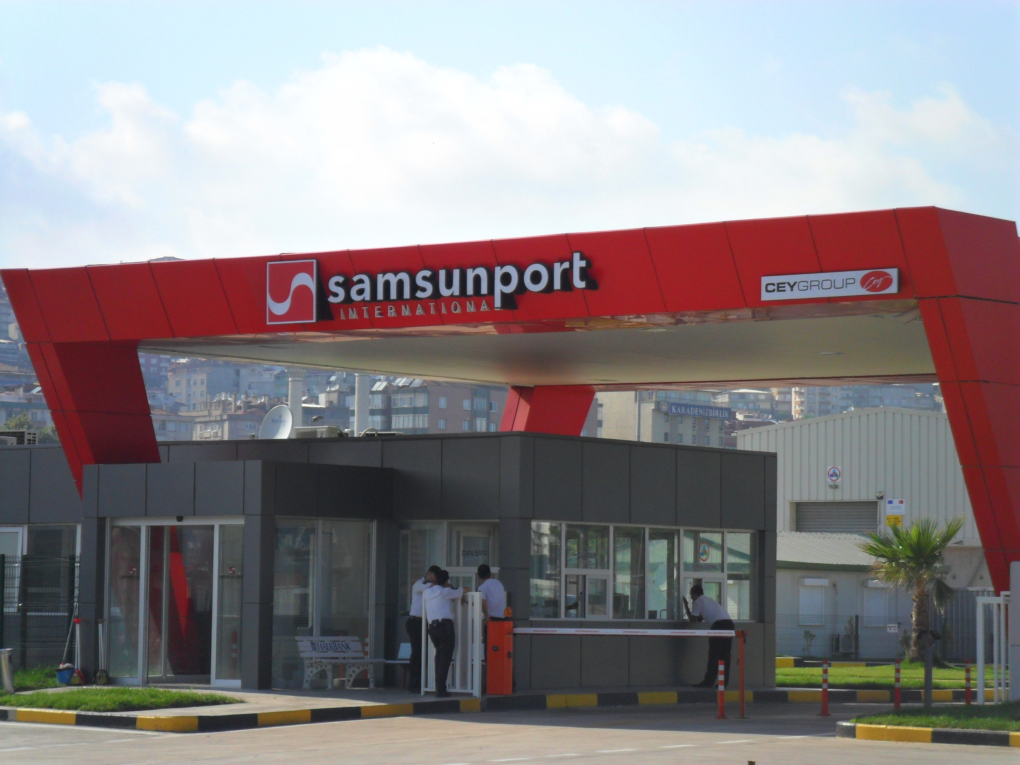 Samsun Sahil Yolu sonundaki, Yalova Gemisi Cafe&Restaurant yanındaki Samsunport giriş kapısı.